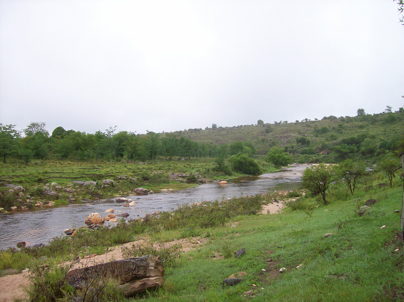 El Río Yuspe a 2 kms de Cosquín antes de su desembocadura en el Rio Cosquín